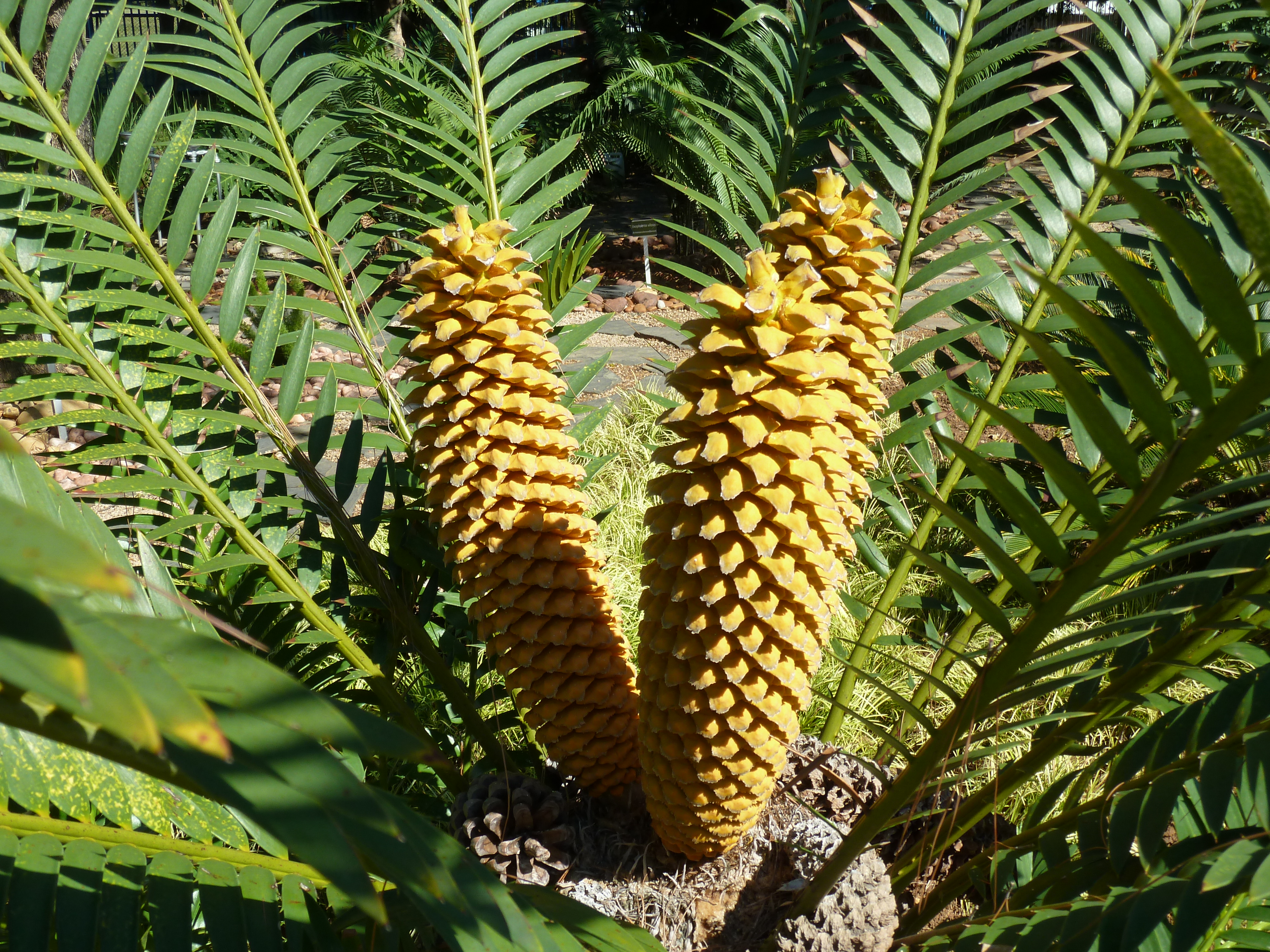 Drie keëls van 'n Oos-Kaapse broodboom in die Koeltetuin, Afrikaanse Hoër Meisieskool, Pretoria